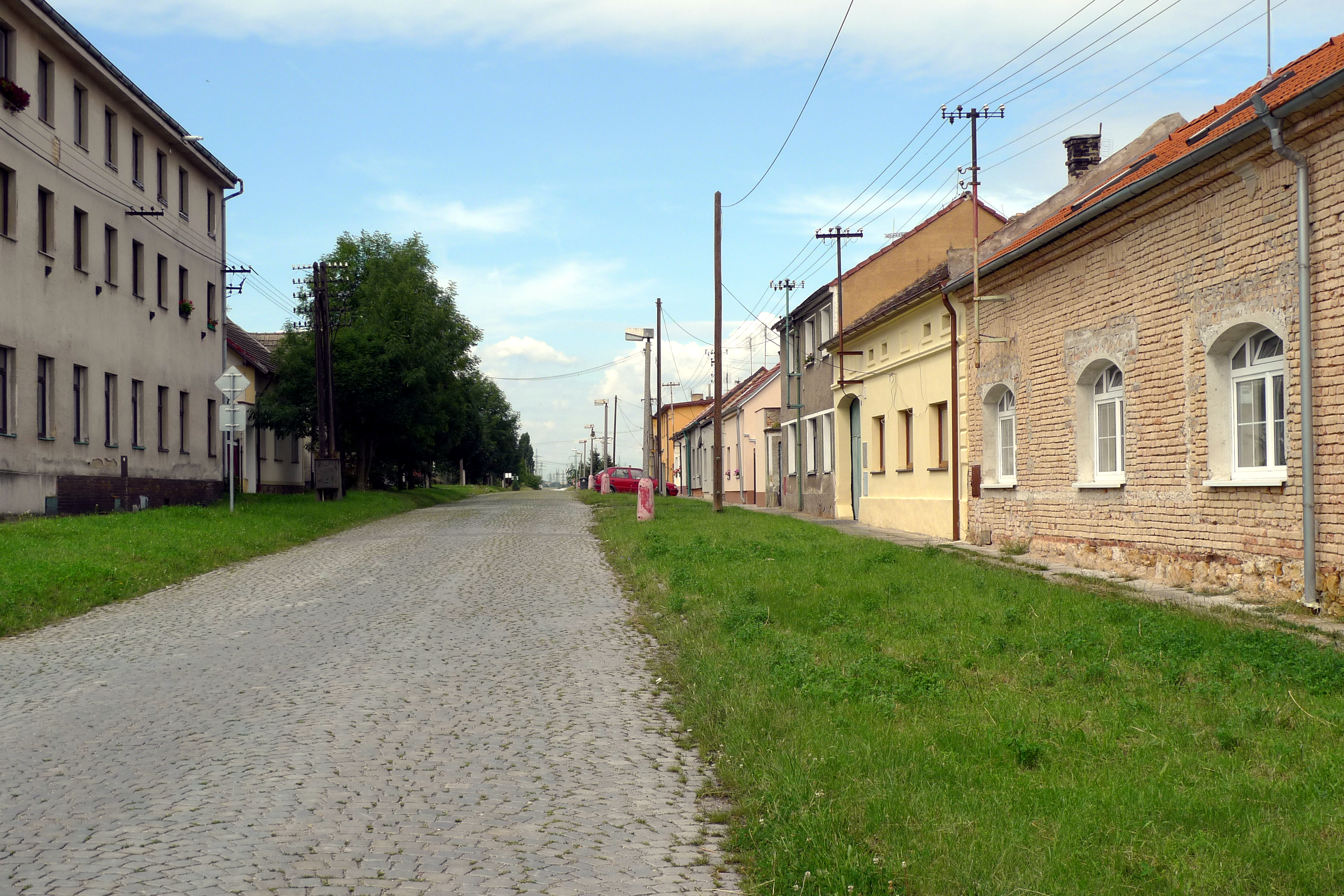 Ulice 5. května ve středočeském Mochově - kdysi nejrušnější ulice obce